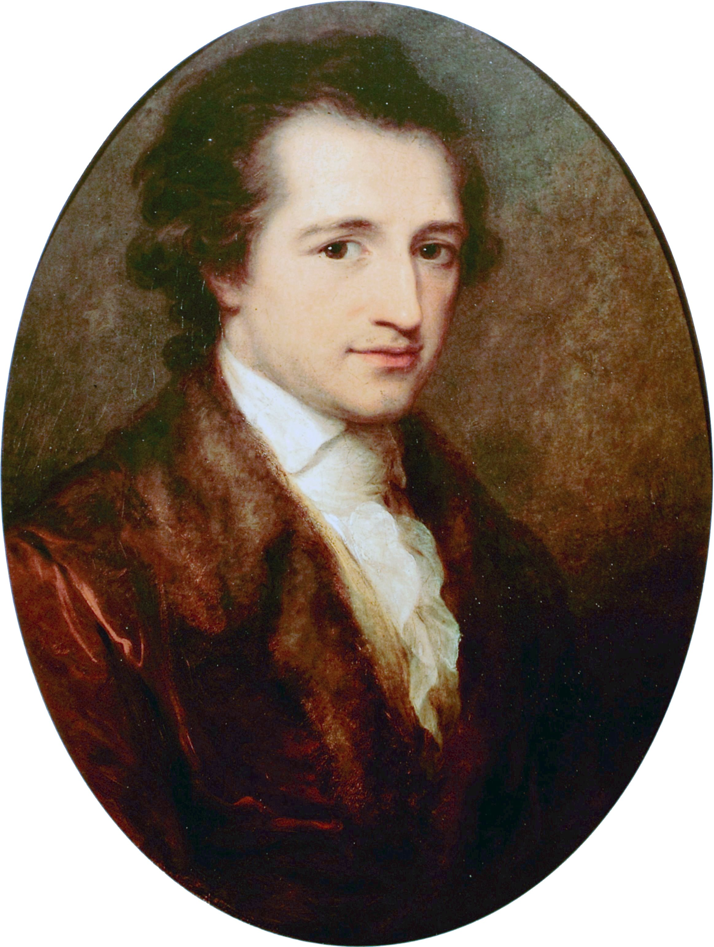 Bildnis Johann Wolfgang von Goethe; Weimar, Goethe-Nationalmuseum.